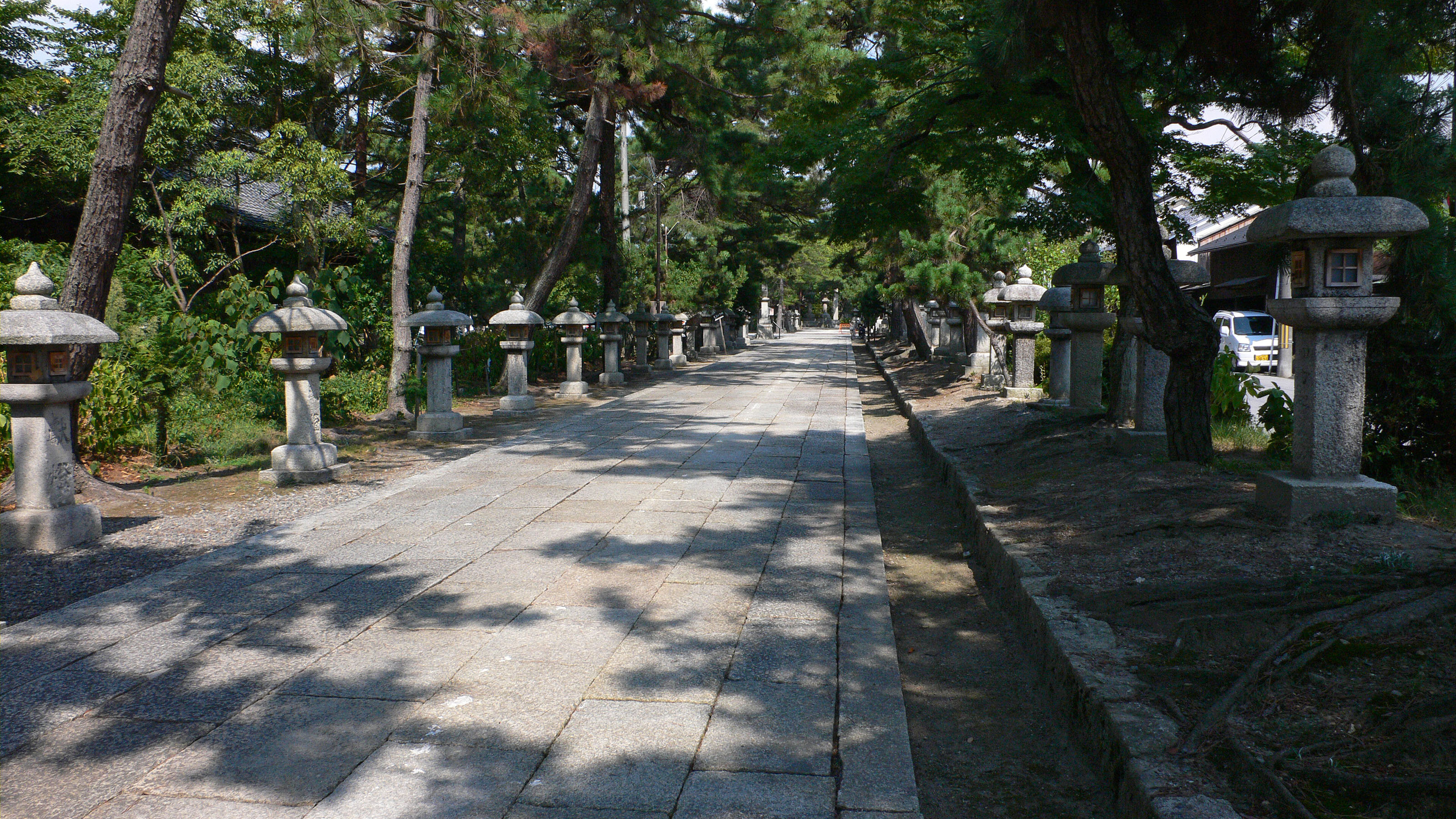 Nagahama-hachimangu in Nagahama, Shiga, Japan